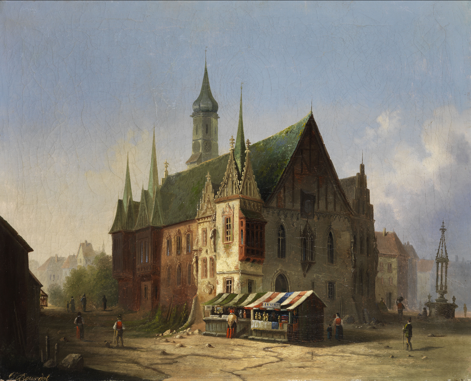 Rathaus in Breslau, in historisierender Darstellung im Zustand vor 1800; Öl auf Leinwand, 55 x 68 cm. Links unten signiert.